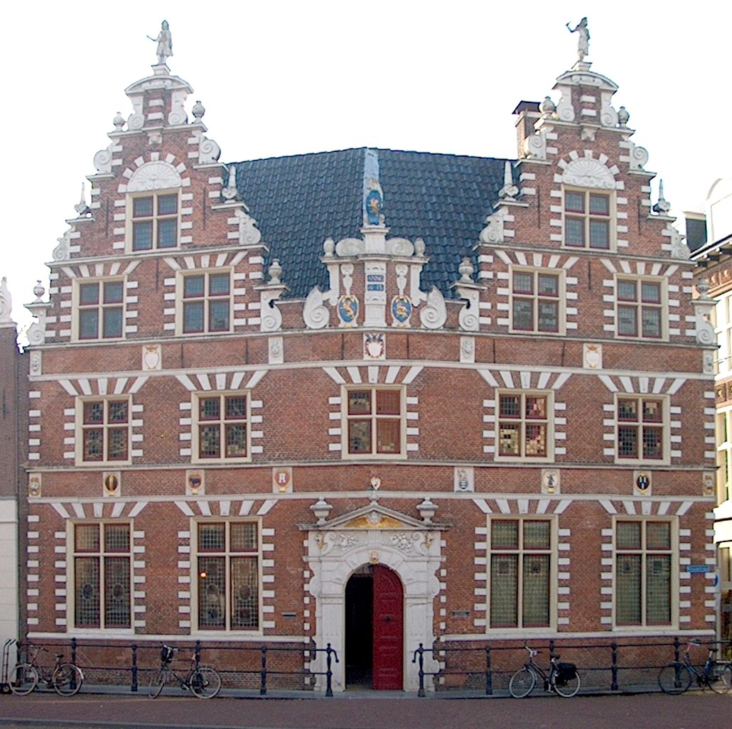 Statenlogement (1613); voormalig stadhuis (-1997), Hoorn, Nederland.